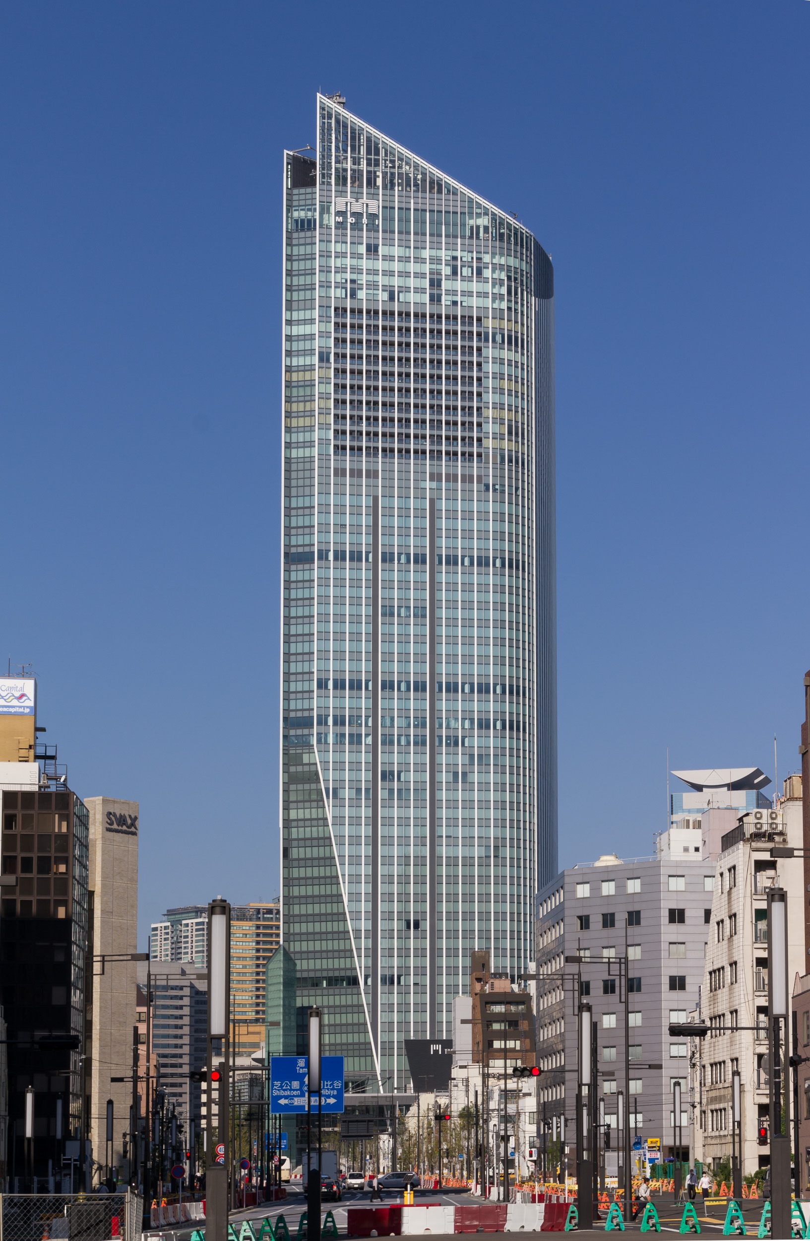 虎ノ門ヒルズ（東京都港区）